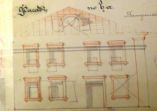 Фасад Лідскай сінагогі 1893 года